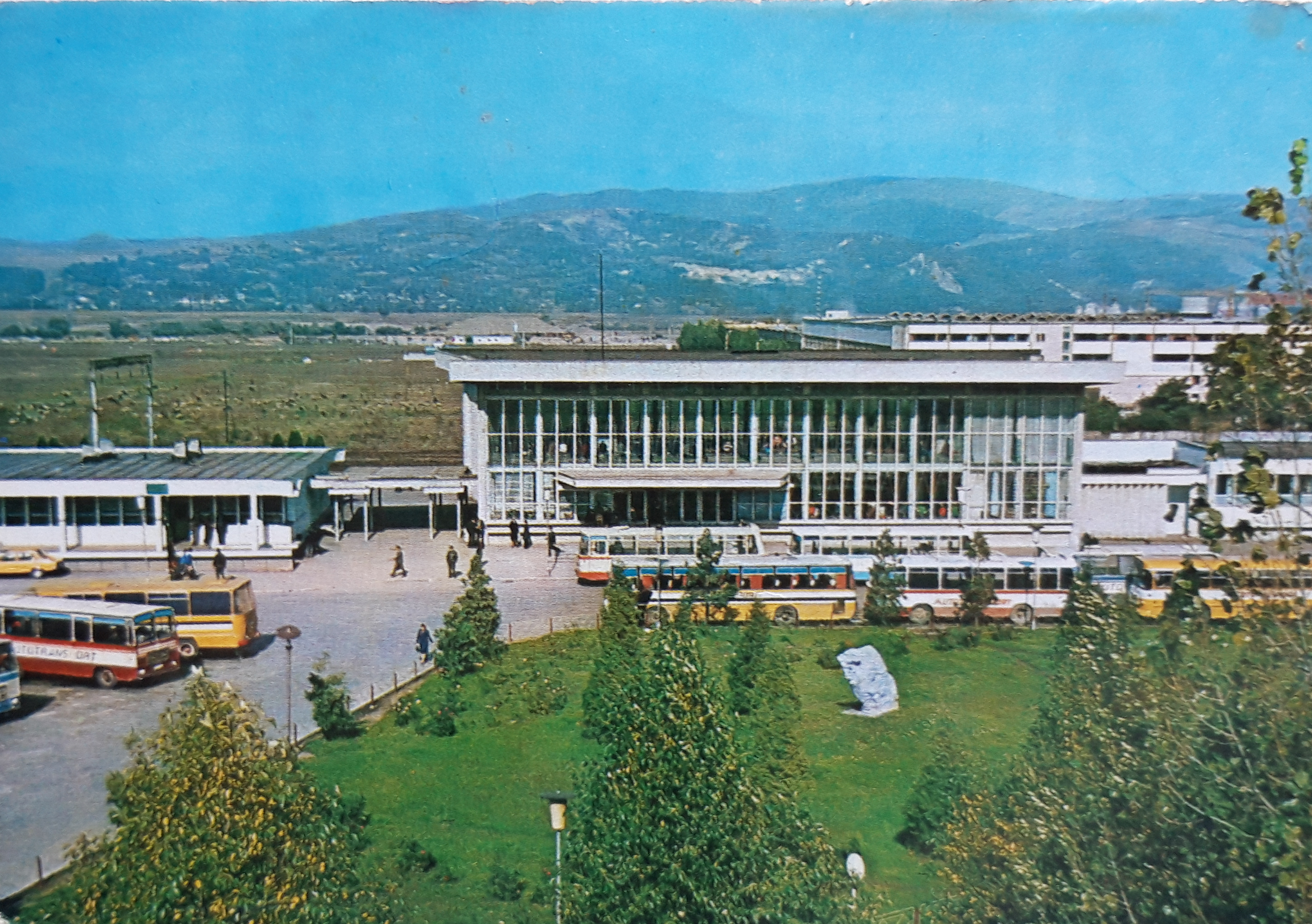 Gara Gheorghe Gheorghiu-Dej (Onești) și o parte din autogară.